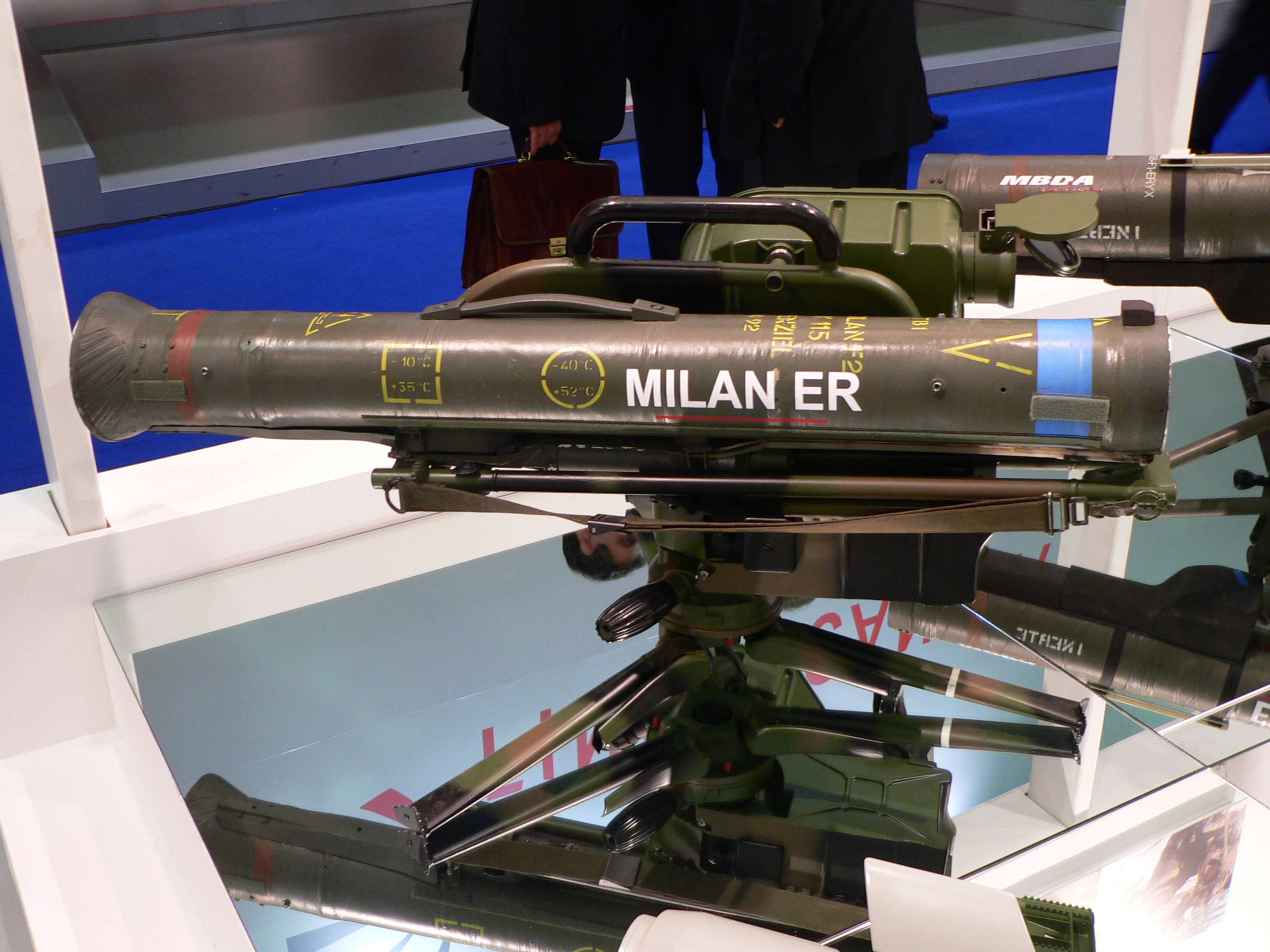 MILAN anti-tank missile